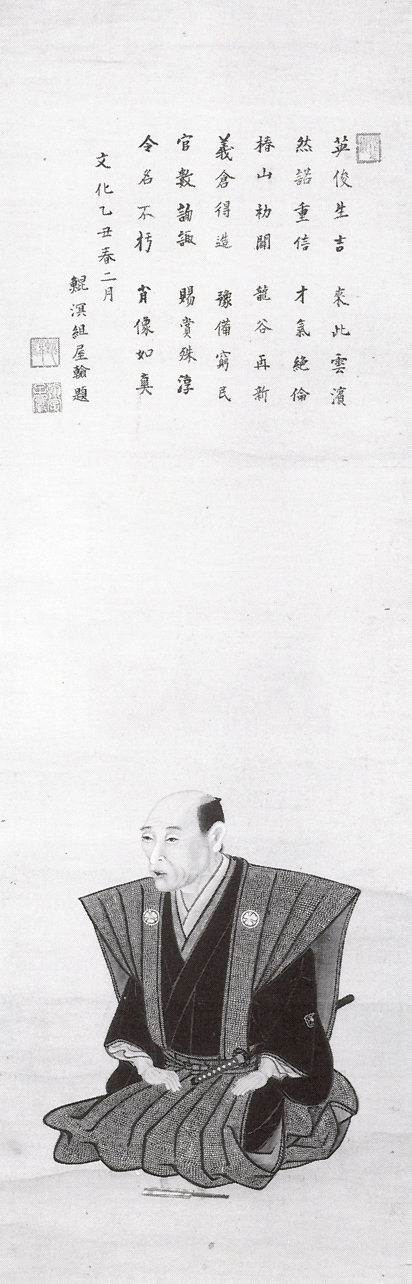 酒井忠貫の肖像。